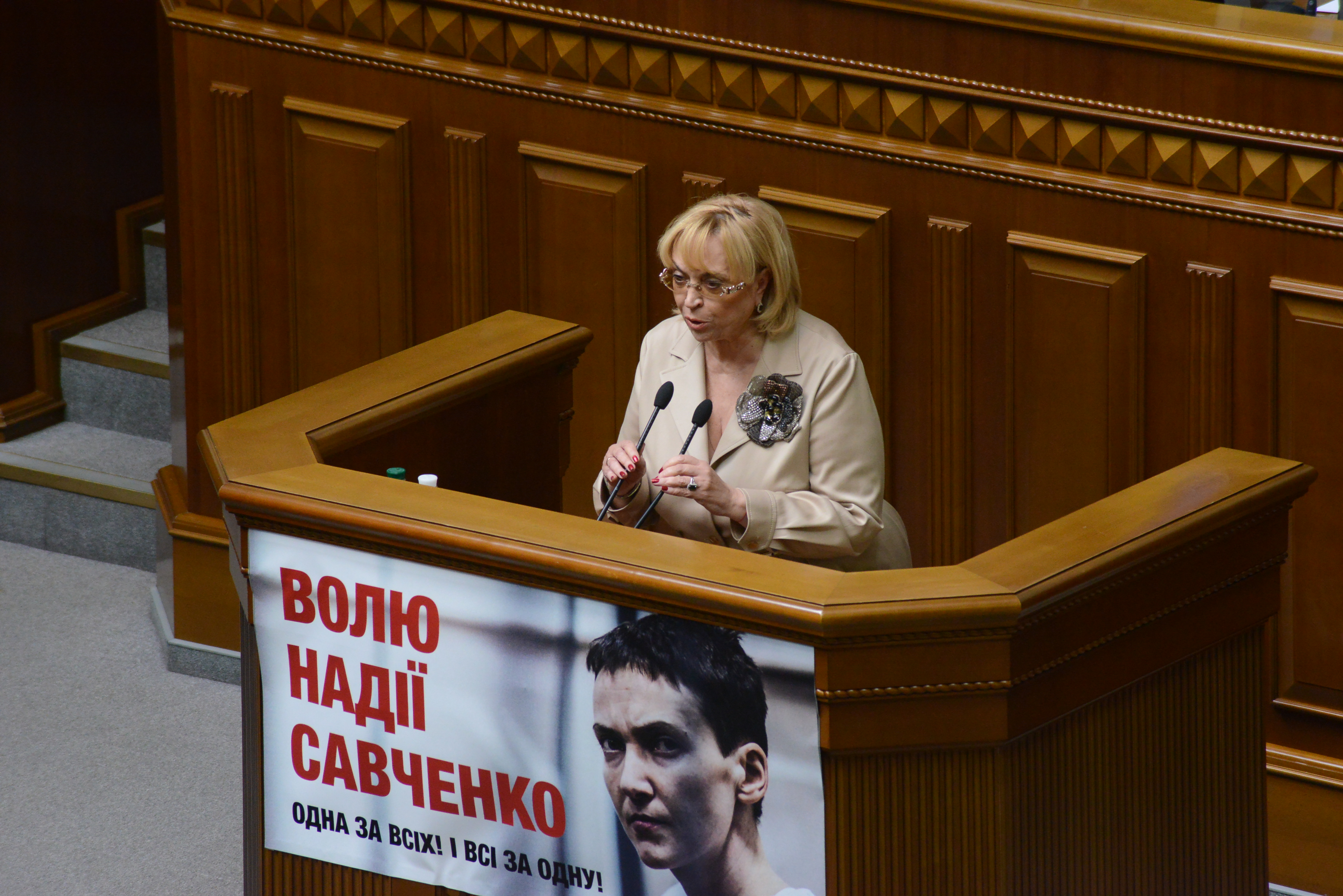 ВЕРХОВНА РАДА УКРАЇНИ 2015 фотограф Вадим Чуприна